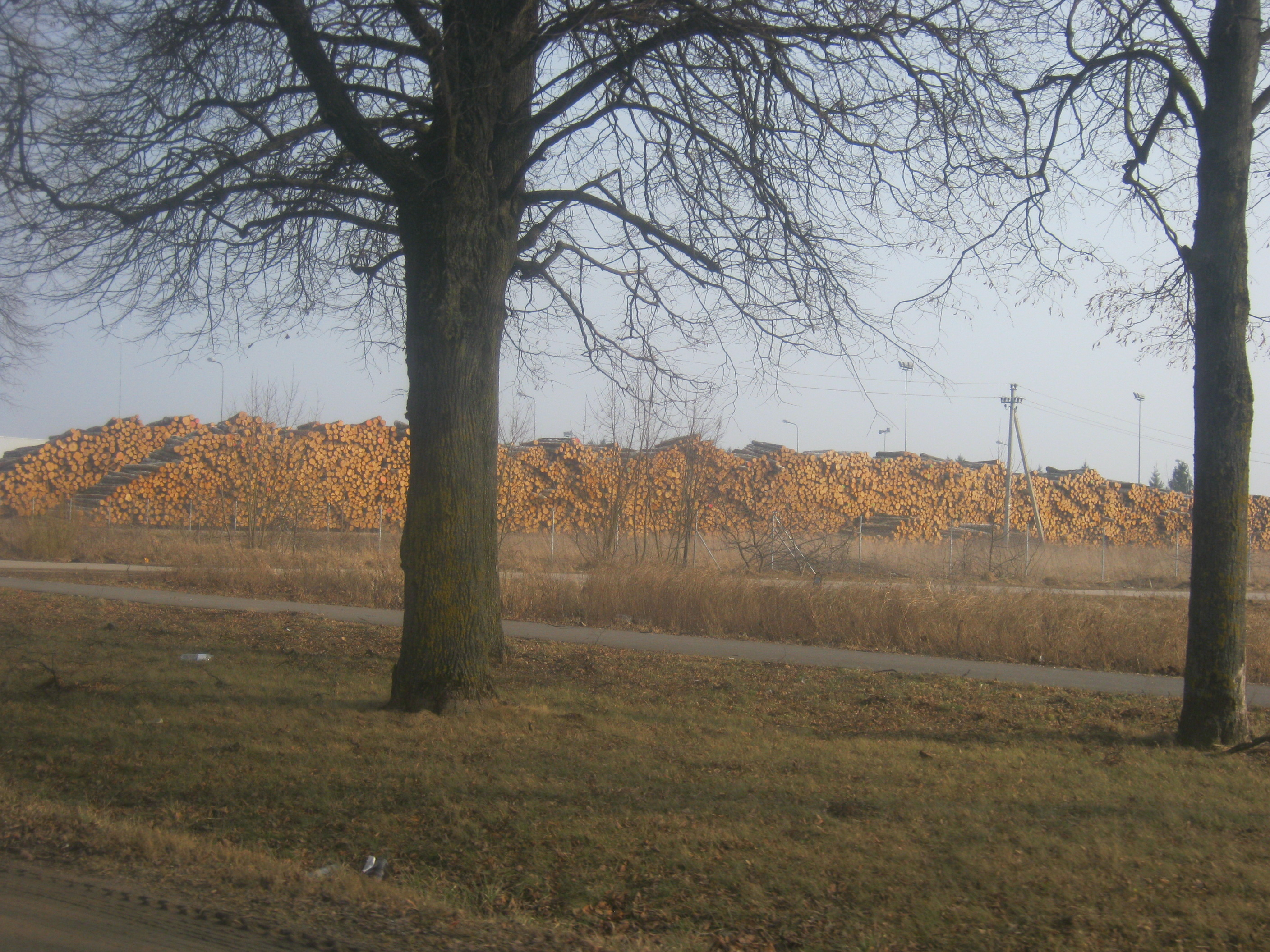 Ukmergė